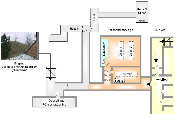 Grafik zeigt die unterirdischen Gänge zwischen dem Nachrichtenbunker Strausberg, dem Operativen Führungszentrum und dem MfNV